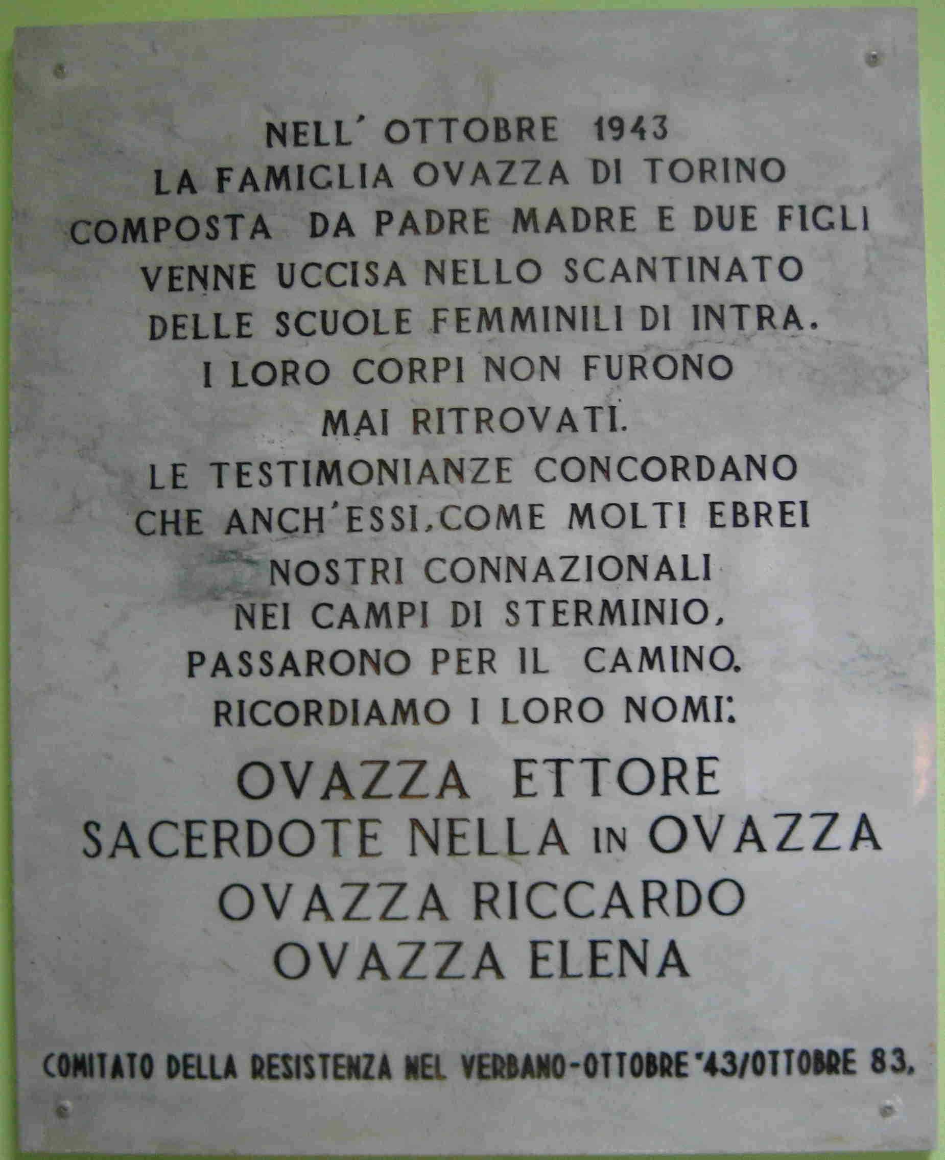 Gedenktafel in Verbania/Intra zur Erinnerung an das Schicksal der Familie Ettore Ovazza, die im Oktober 1943 kurz nach der deutschen Besetzung Italiens von der Leibstandarte SS Adolf Hitler ermordet wurde.